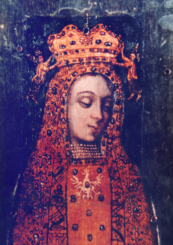 Matka Boska Licheńska bez koron